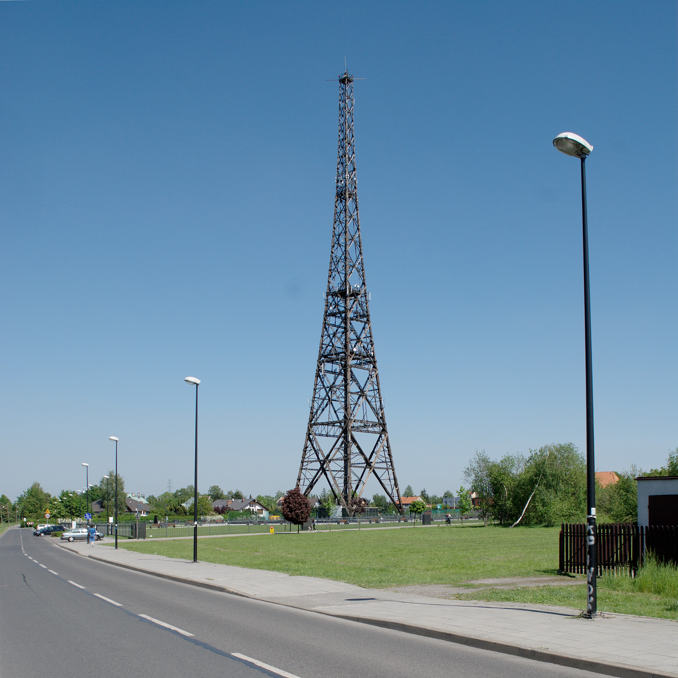 Gliwice. Radiostacja.